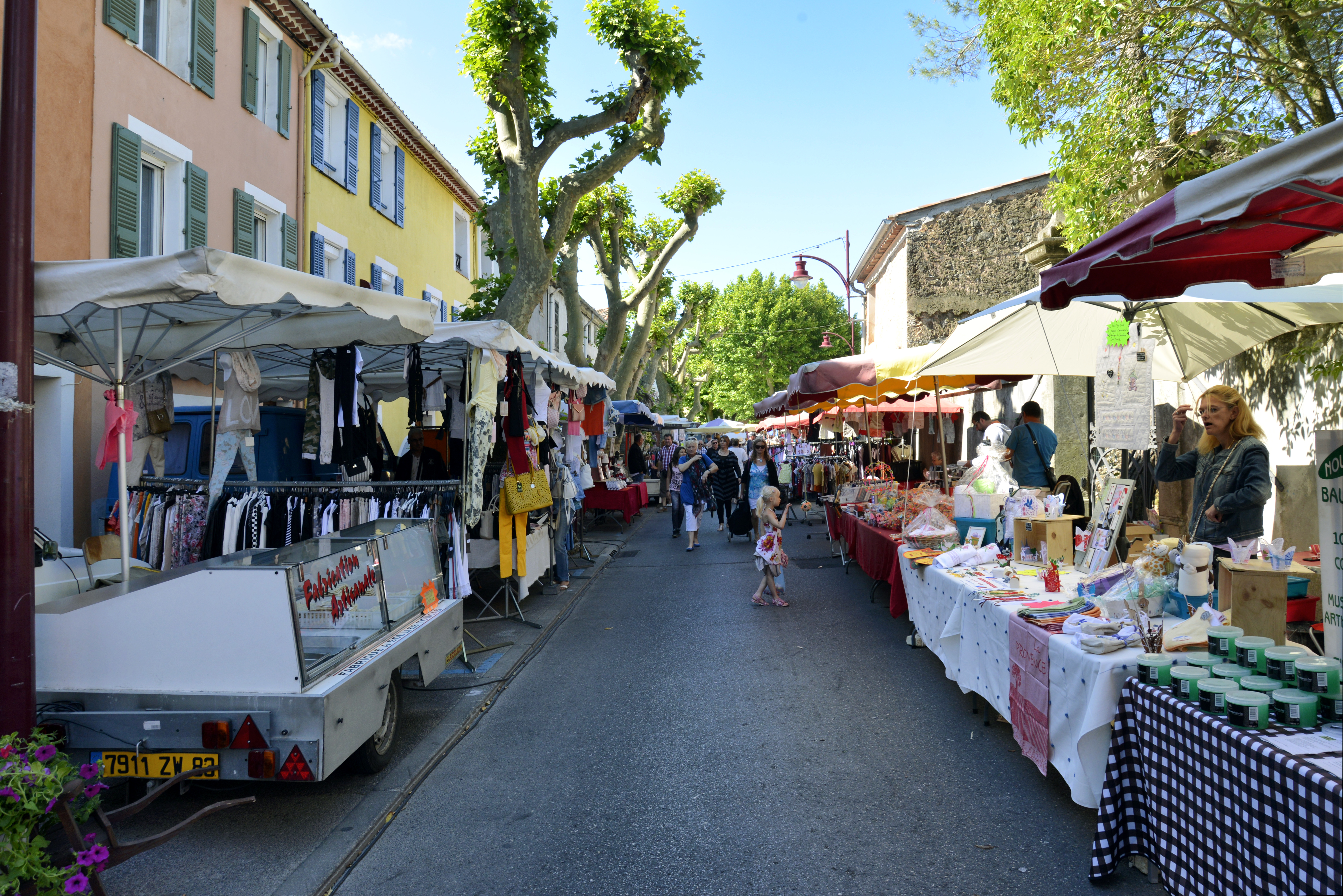 Garéoult, Var (Provence) - Marché du mardi dans les rues du centre ville